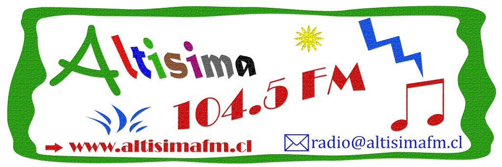 Pendon Altisima FM